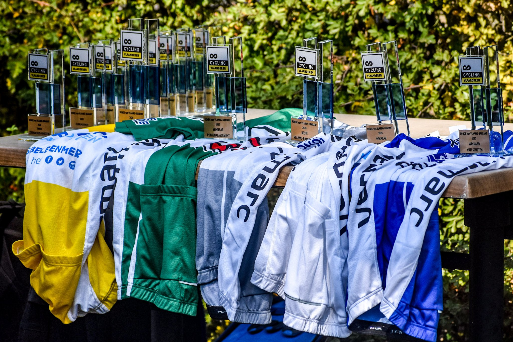 Truitjes